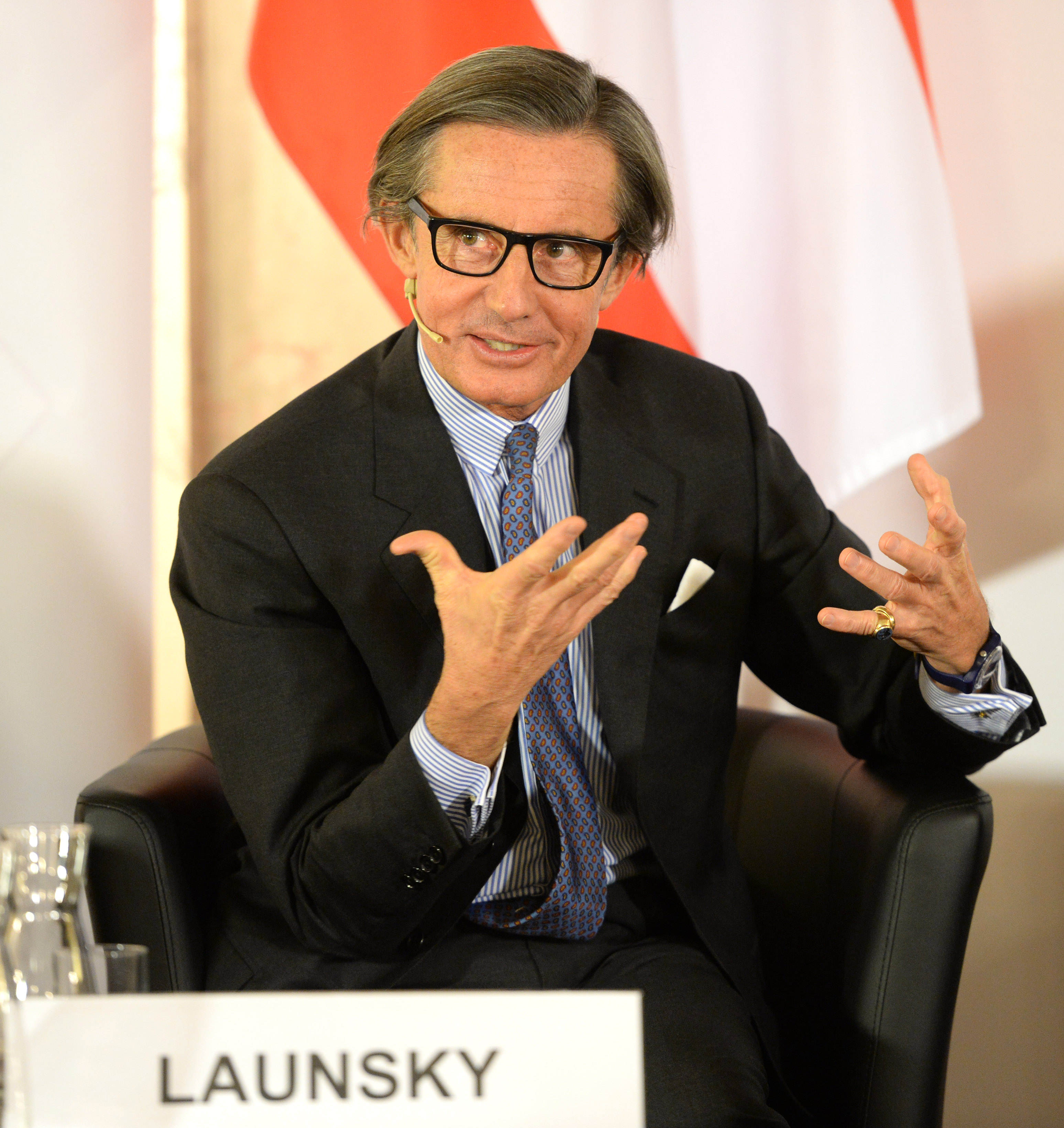 Wien am 8.11.2017 fand im Alois-Mock-Saal im Außenministerium der "#Youth Talks 17" mit dem Thema "Die Rolle der Diplomatie im 21. Jahrhundert" statt. Foto: Mahmoud